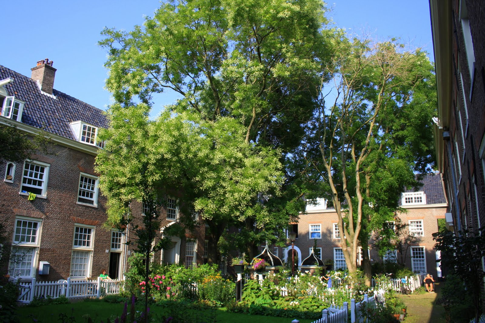 Huiszittenweduwenhof, gebouwd 1650 door Daniel Stalpaert voor de Oudezijds en Nieuwezijds Huiszittenmeesters